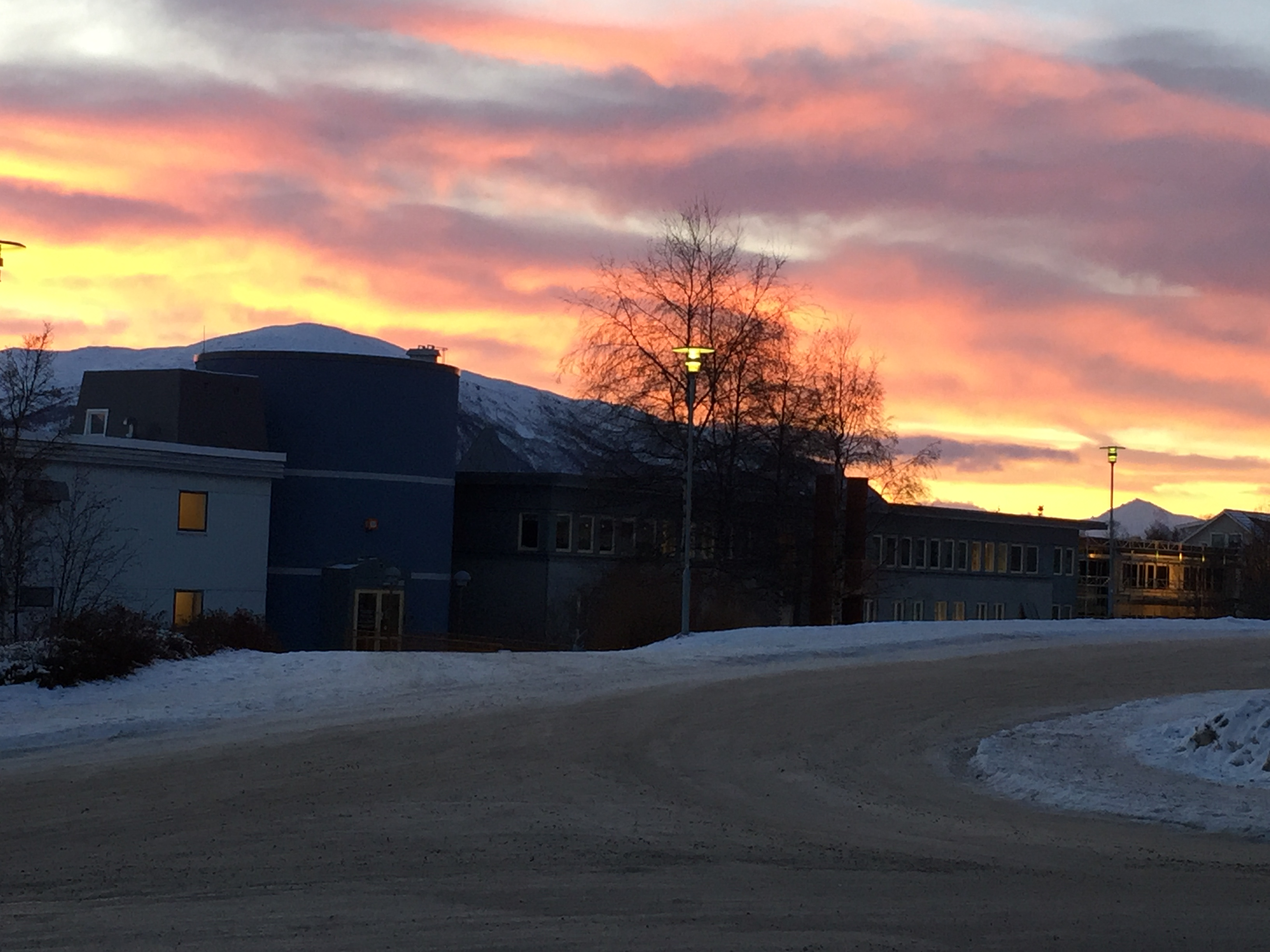 Breiviklia, Tilholdssted for institutt for arkeologi, historie, religionsvitenskap og teologi